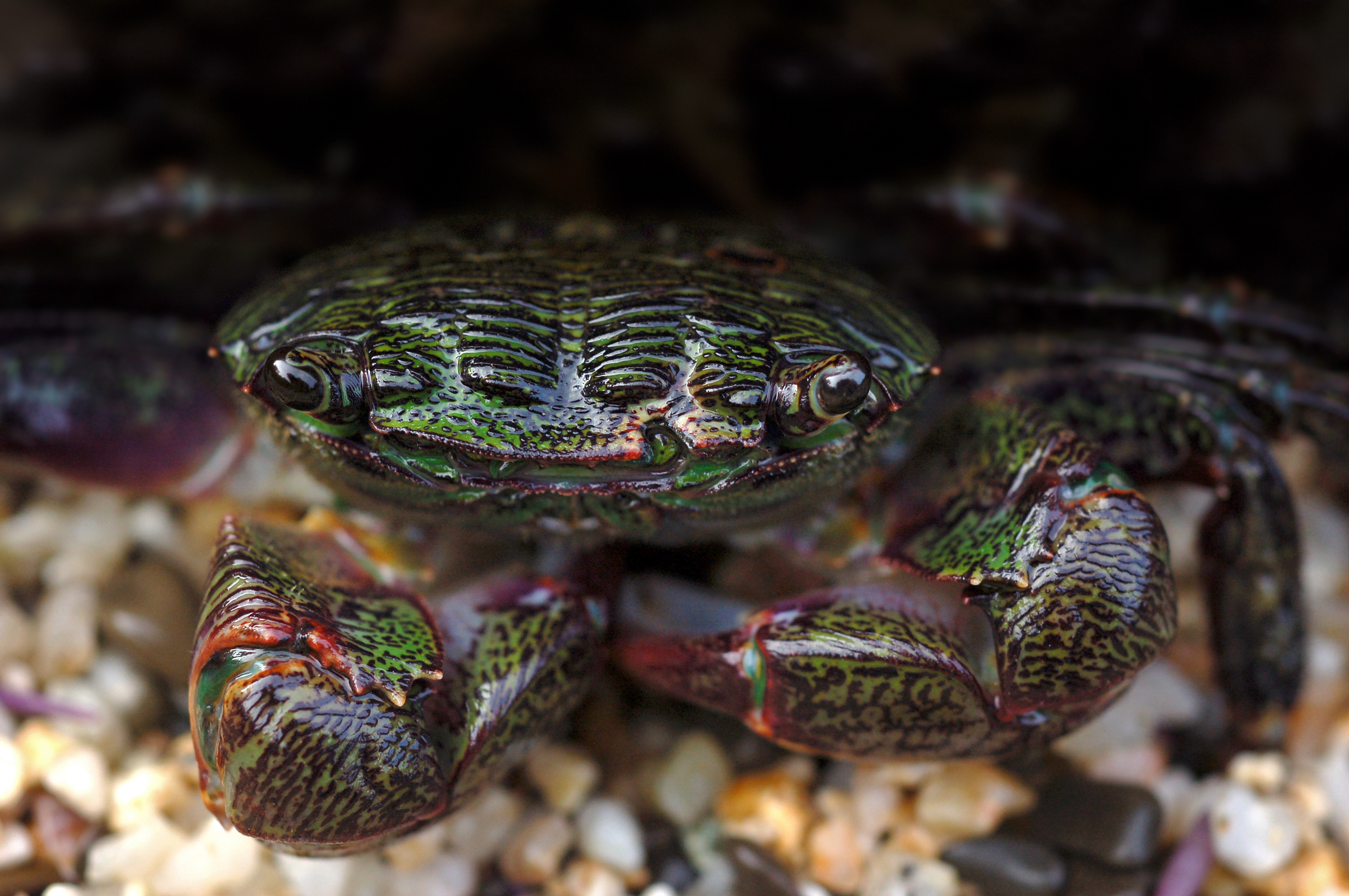 Pachygrapsus crassipes